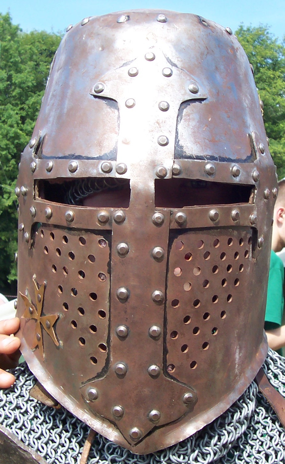 Helm garnczkowy